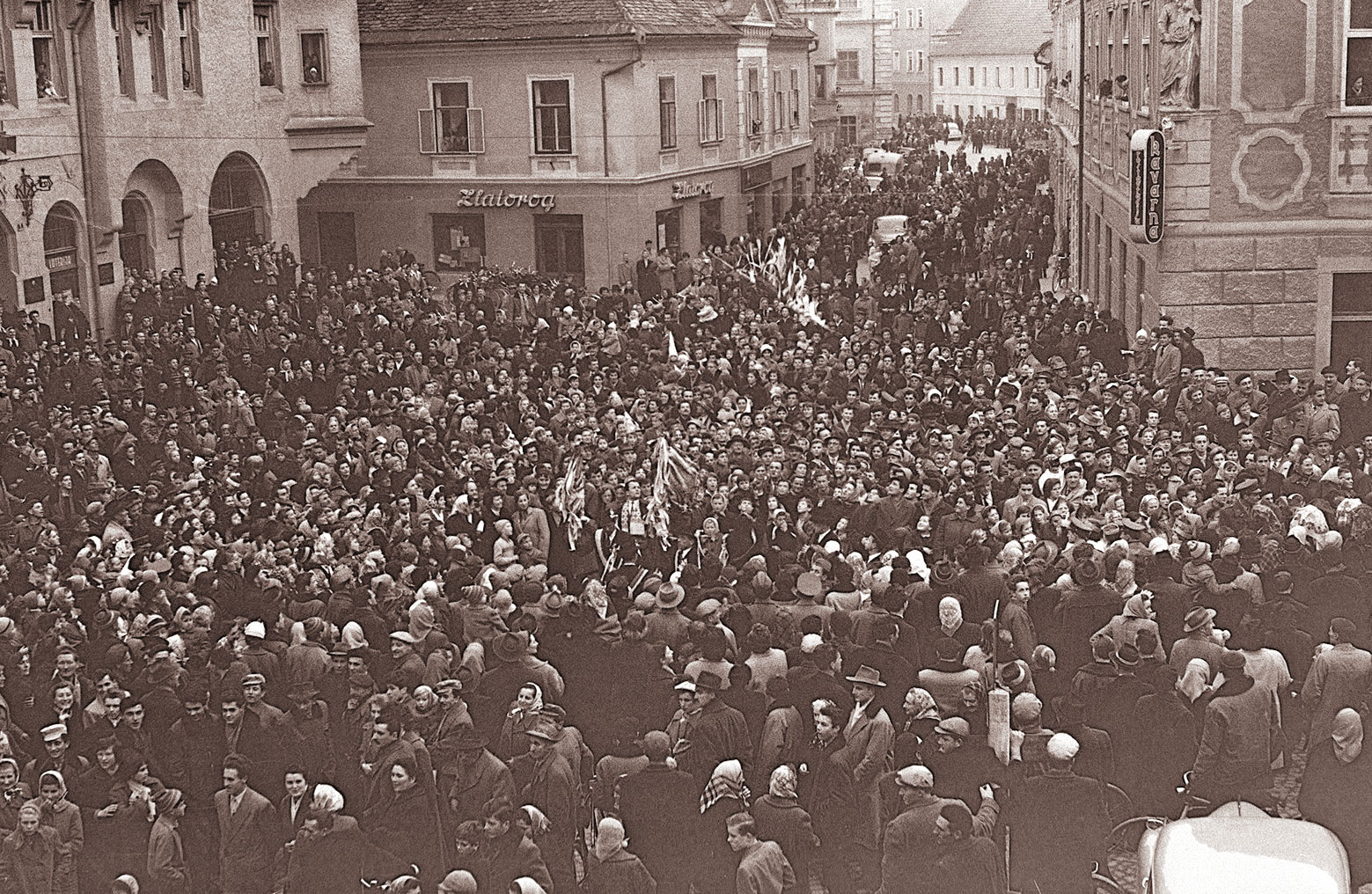 Veliko kurentovanje na Ptuju.